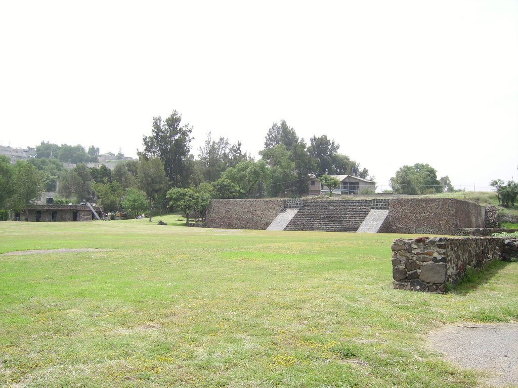 Toma de la explanada de la zona arqueológica "Los Pochotes"